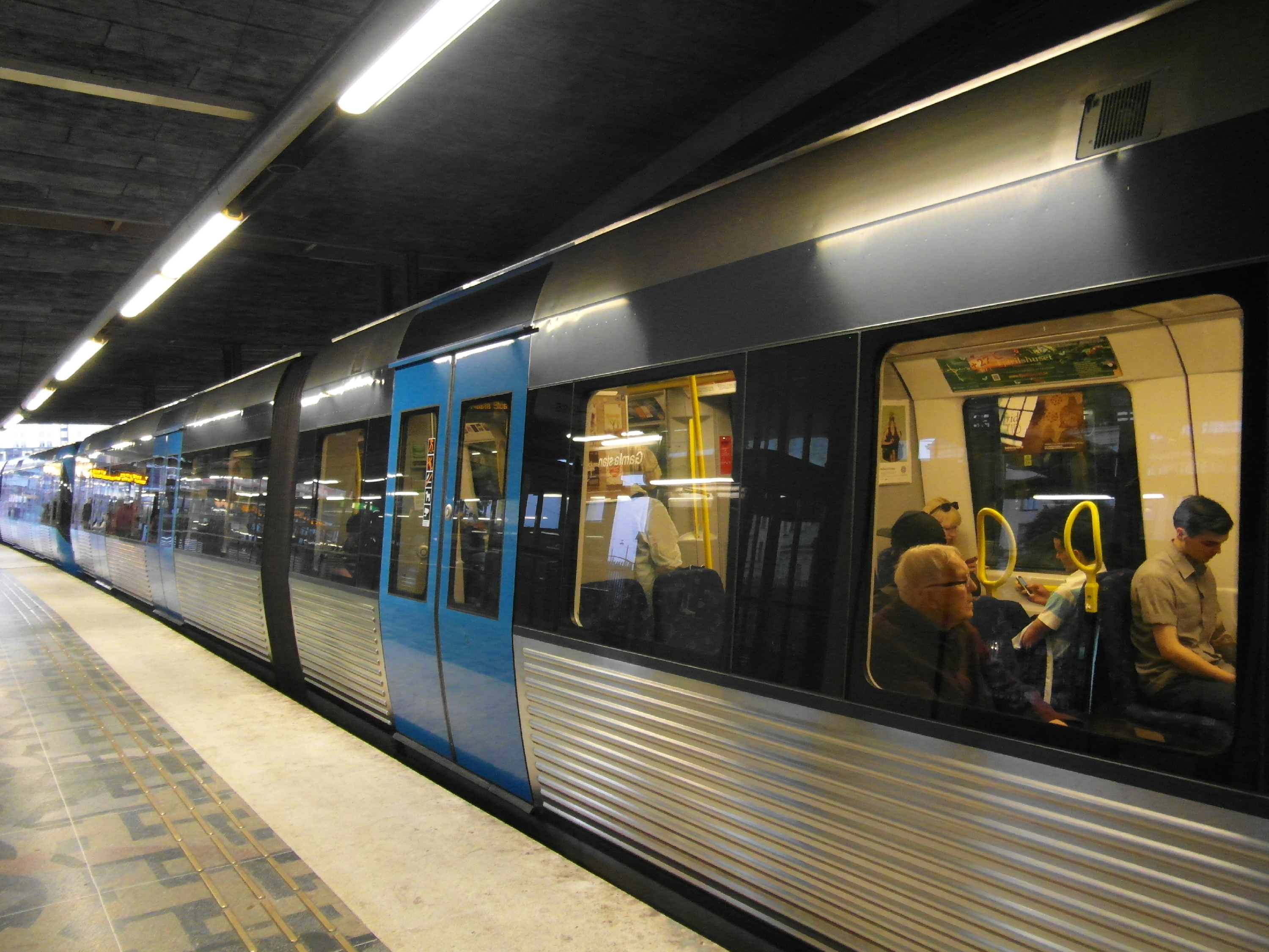 Röda linjen - T13 - T14 Gröna linjen - T17 - T18 - T19